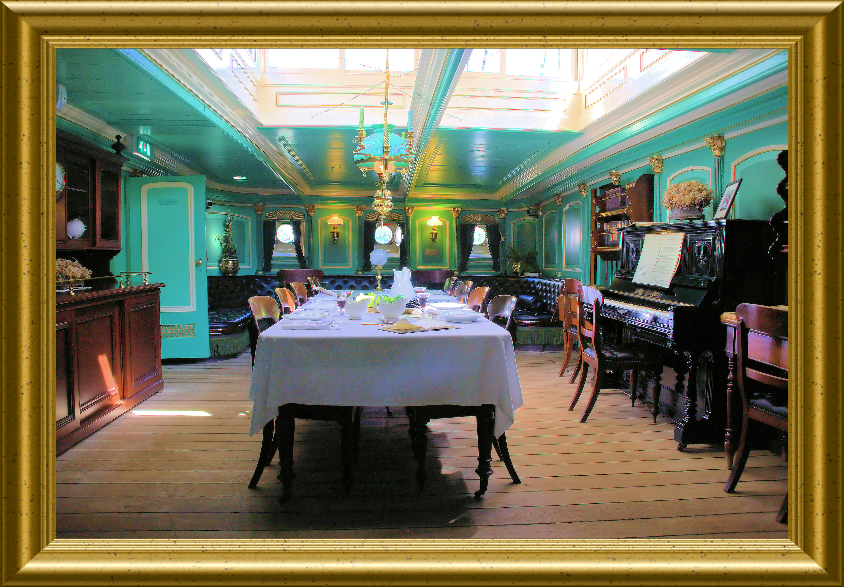 Longroom Buffel (Interieur) Maritiem Museum - longroom in museumschip 'De Buffel'